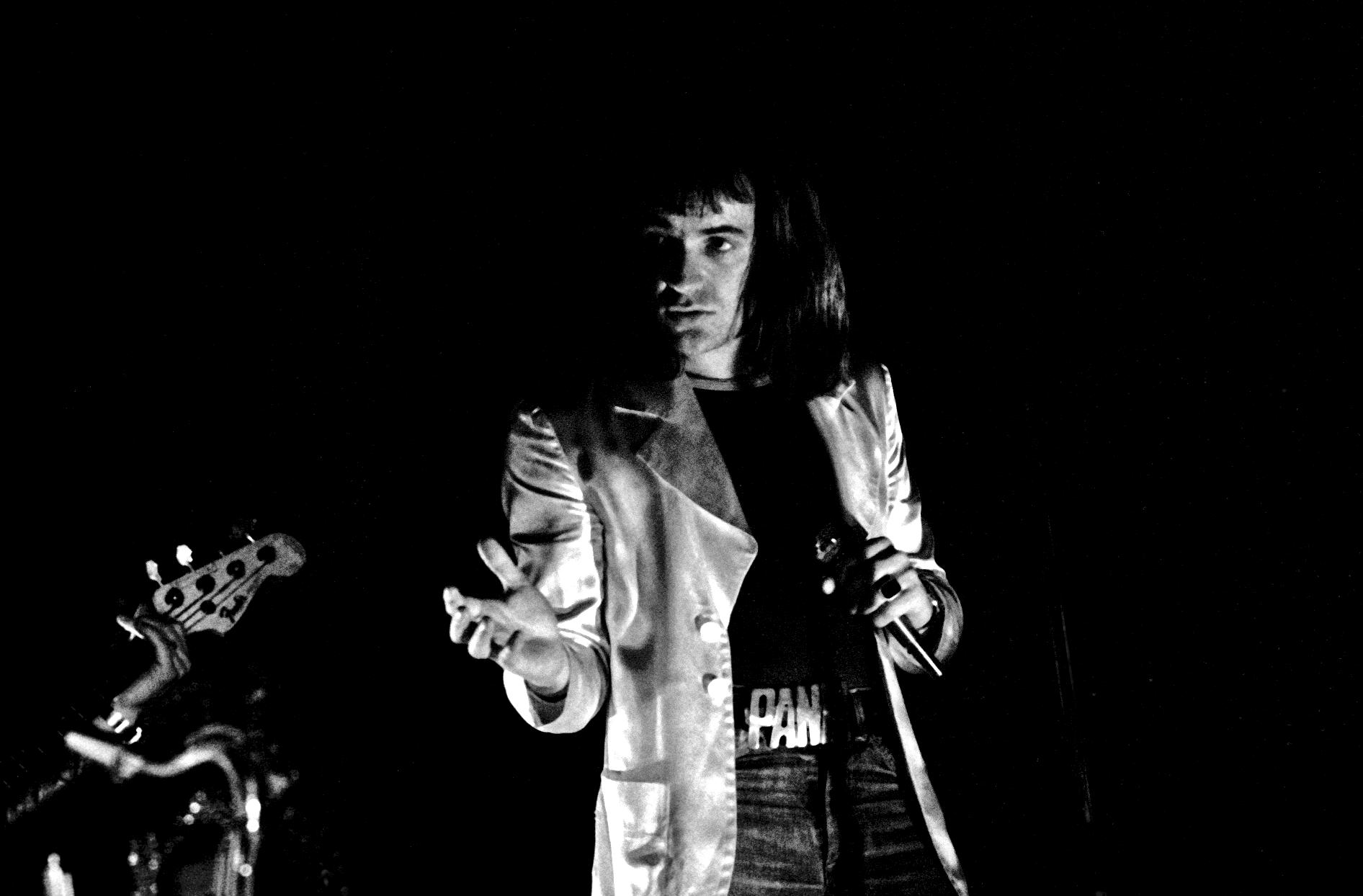 Udo Lindenbergs Panik-Orchester in der Musikhalle Hamburg, 1974 Copyright Heinrich Klaffs